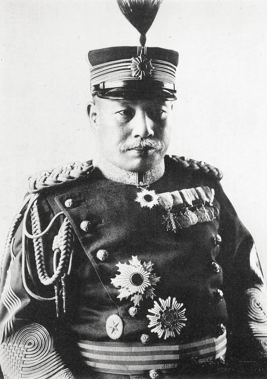 新井亀太郎陸軍中将の写真